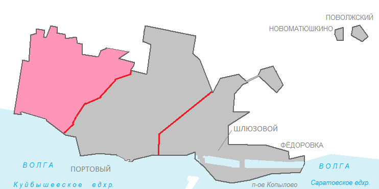 Автозаводский район Тольятти